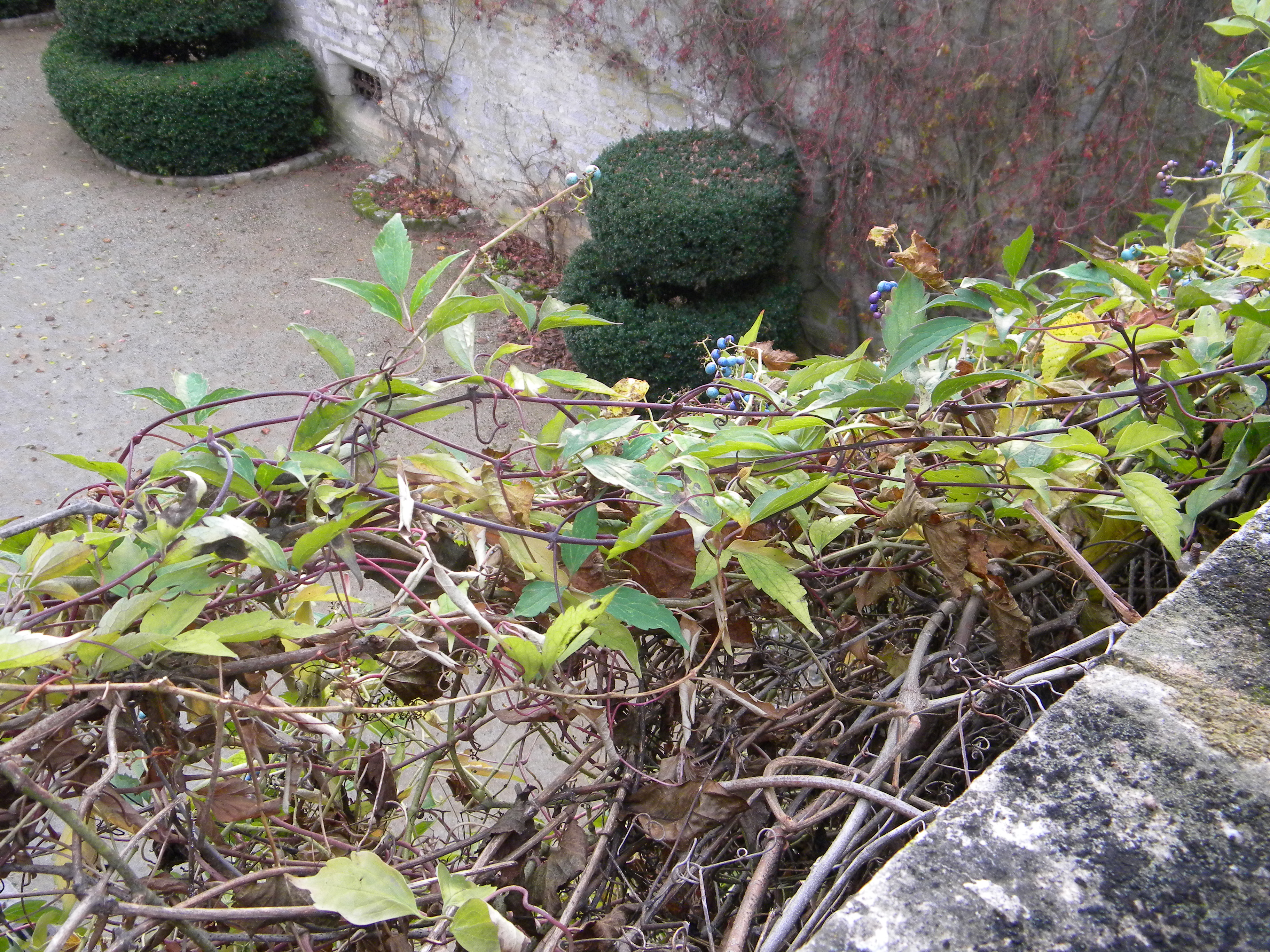 glycyne + clématite + ampélopsis